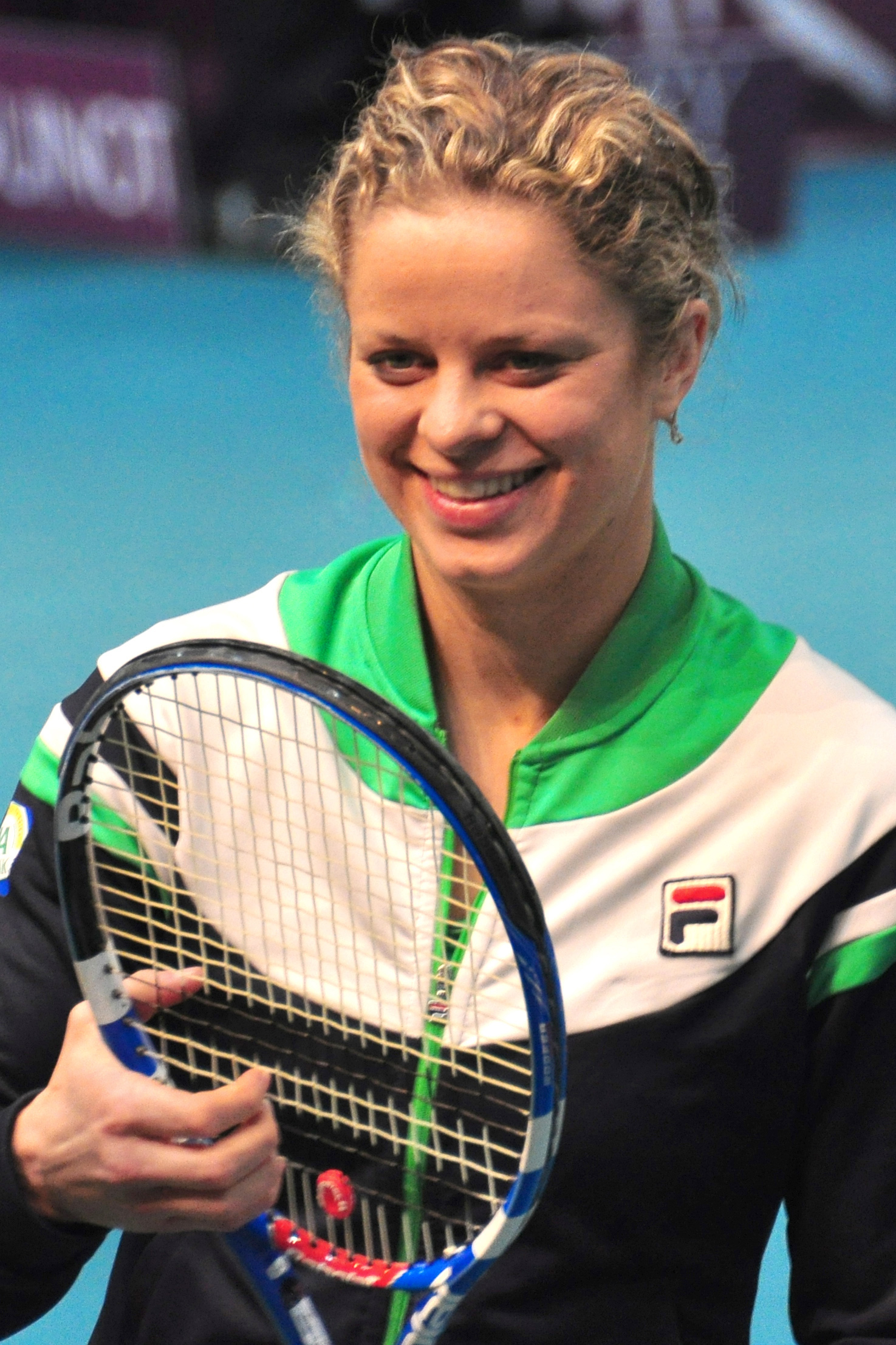 Kim Clijsters à l'Open Gdf Suez